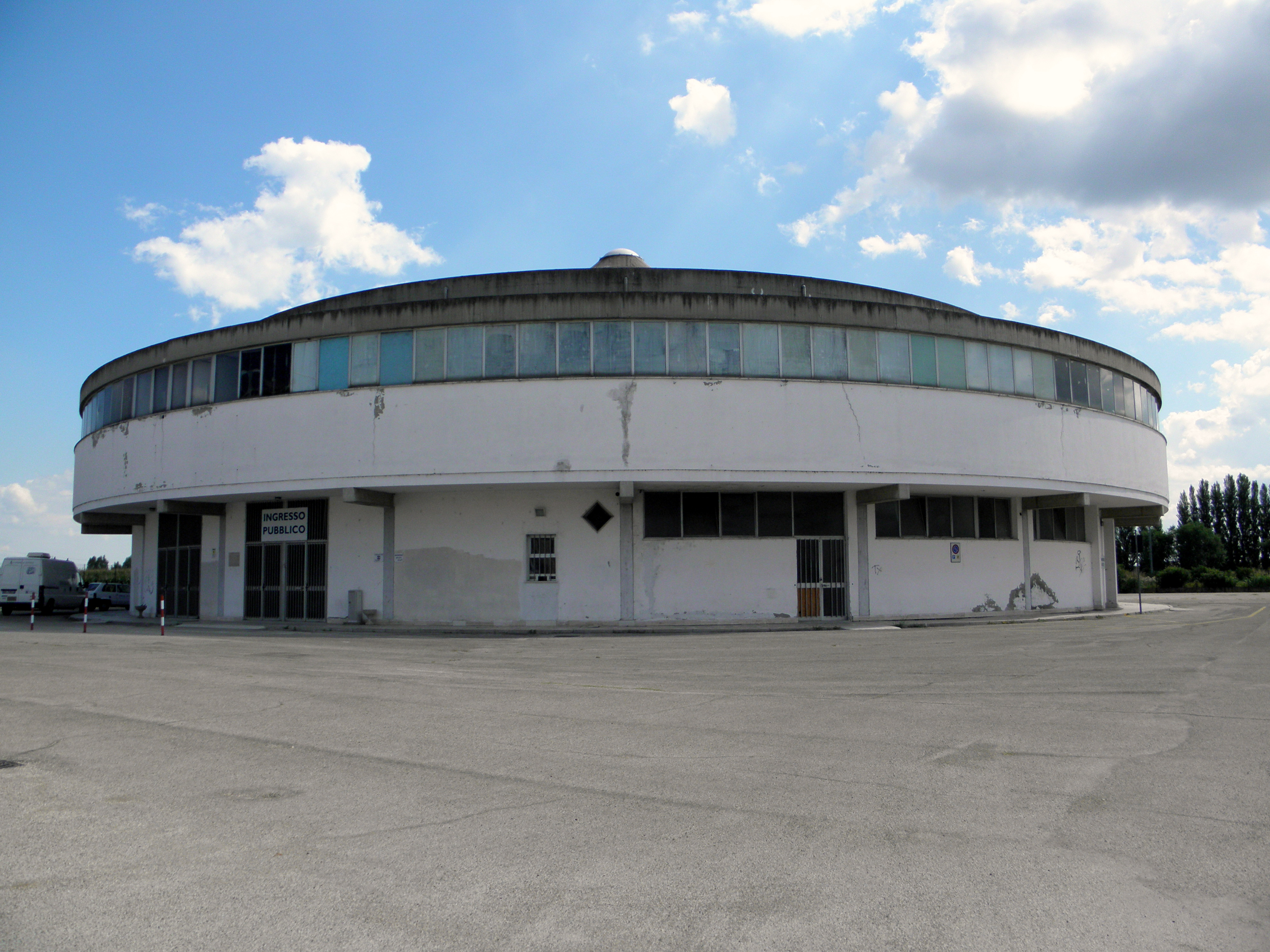 Rovigo, Palazzetto dello Sport.